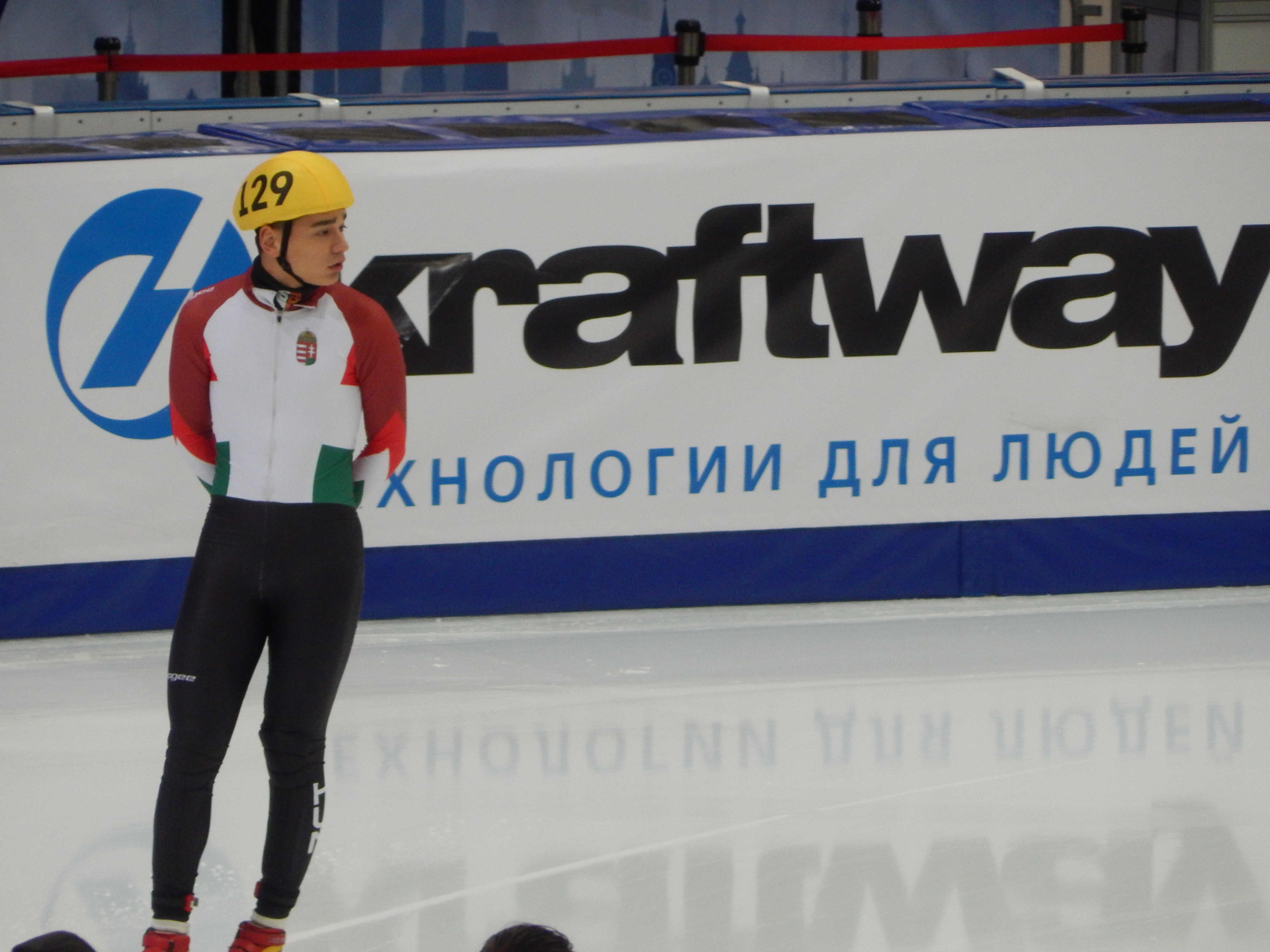 Шаолинь Шандор Лю на чемпионате мира 2015